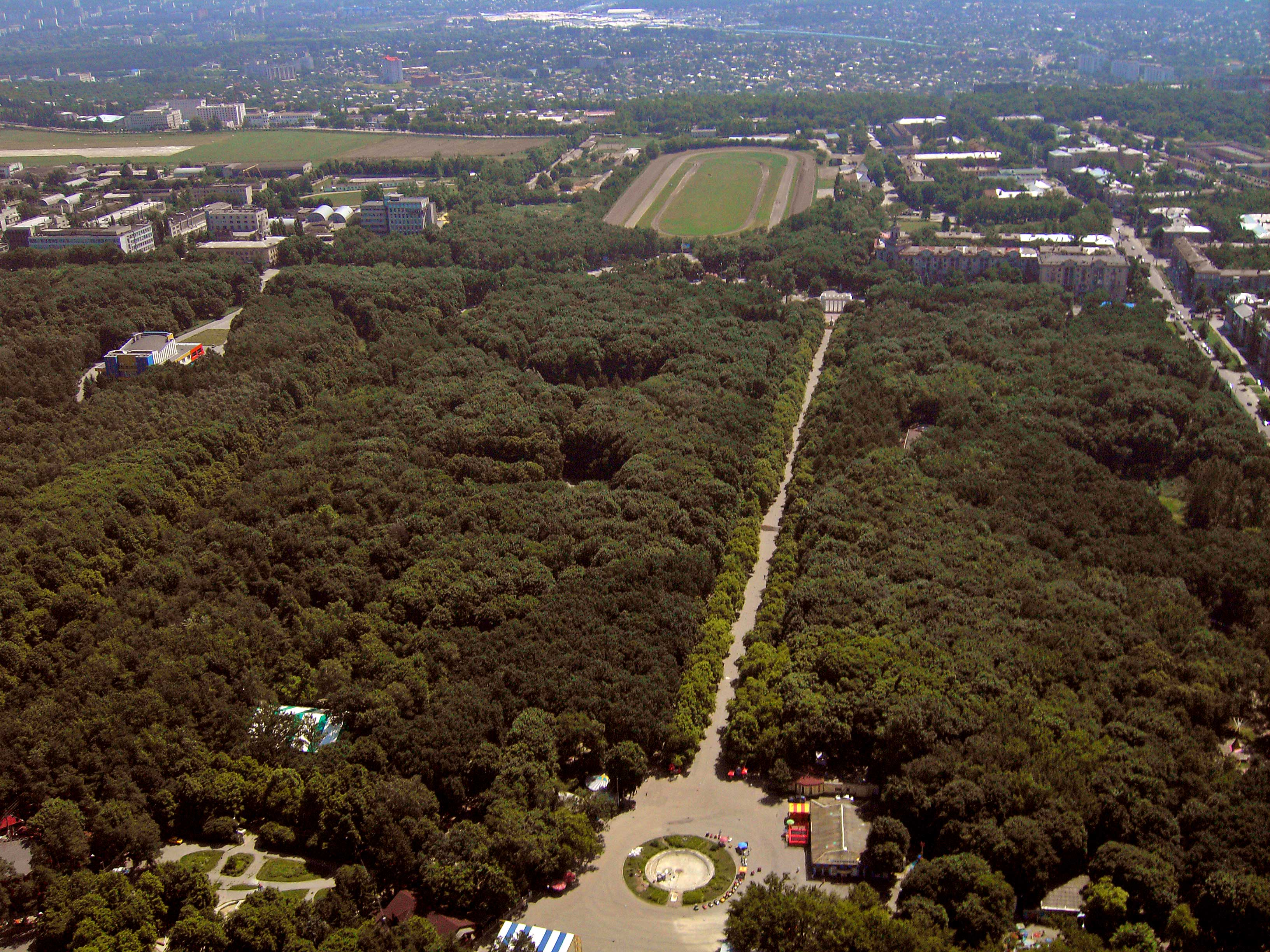 Kharkov Gorky Park Central Alley ru: Центральная аллея ЦПКиО имени Горького в Харькове. Прямо внизу круглый фонтан, слева кинотеатр "Парк", в конце аллеи центральный вход в парк, за ним Сумская, далее ипподром.